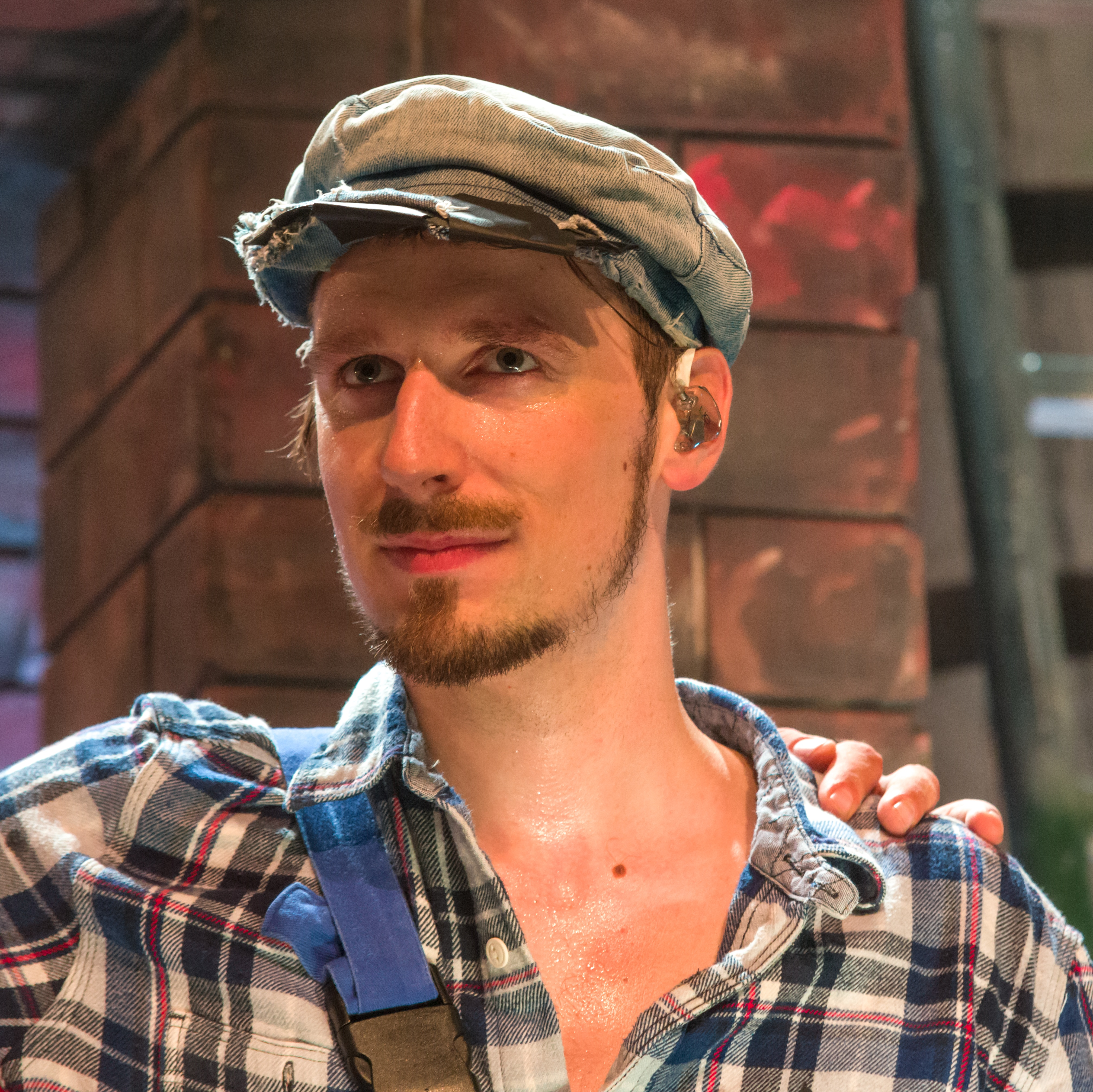 Bilder vom Zelt Musik Festival 2018 in Freiburg im Breisgau Auftritt Alligatoah und Sebel am 20. Juli 2018 im Zirkuszelt